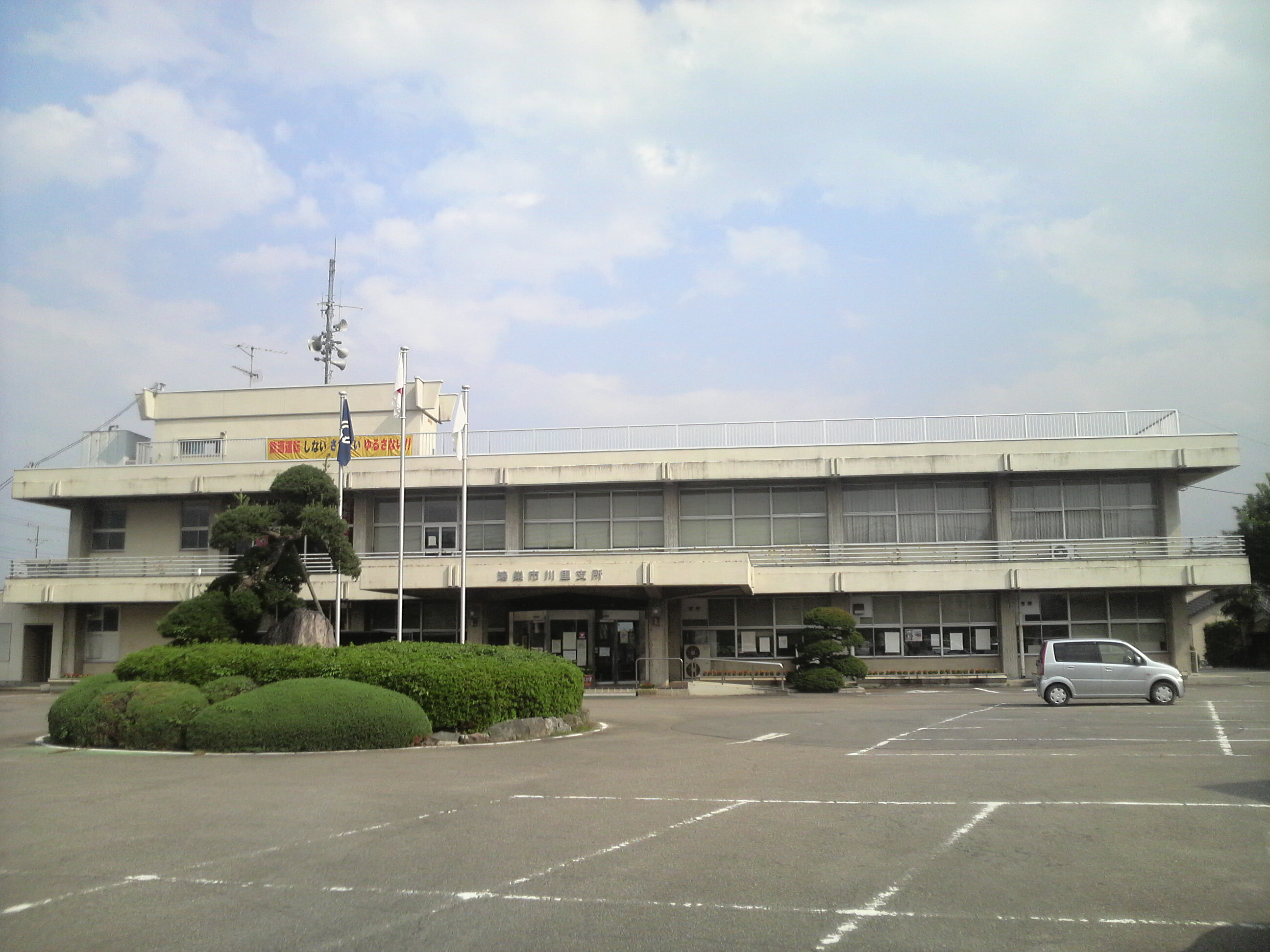 鴻巣市川里支所庁舎